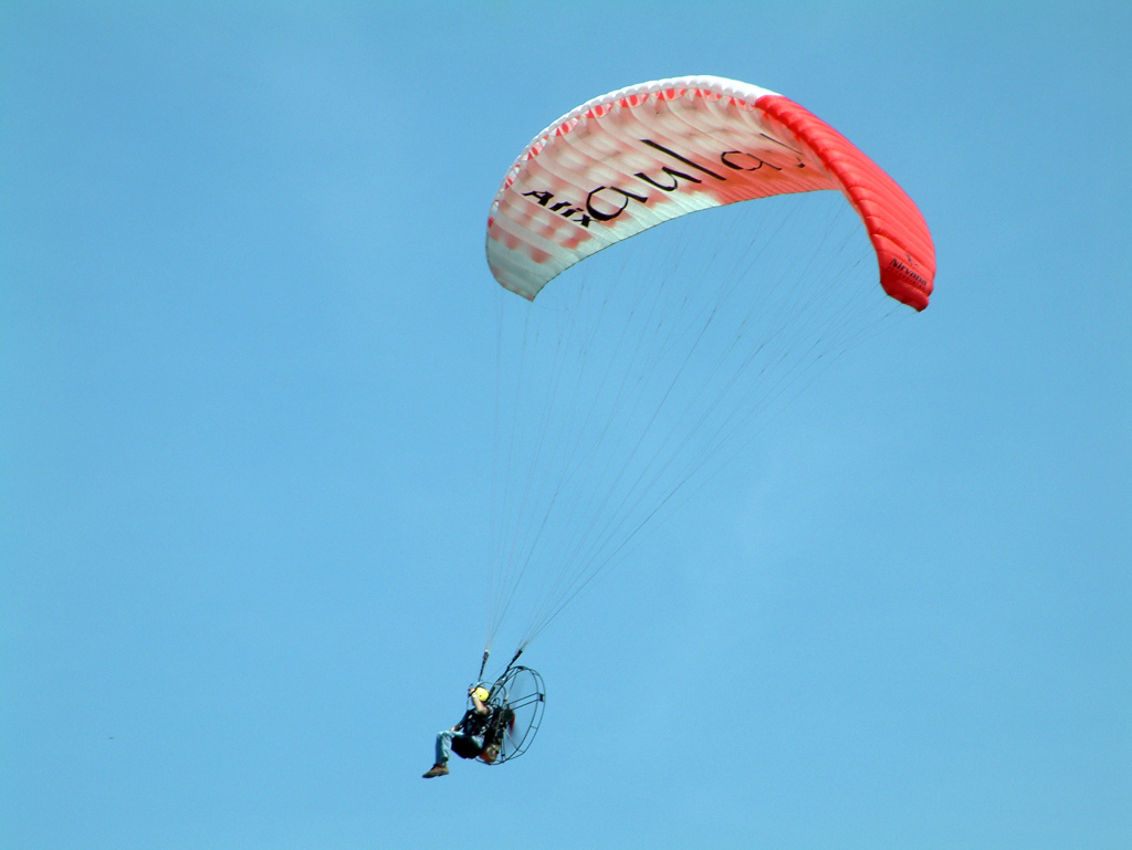 Paragliding in Vilnius